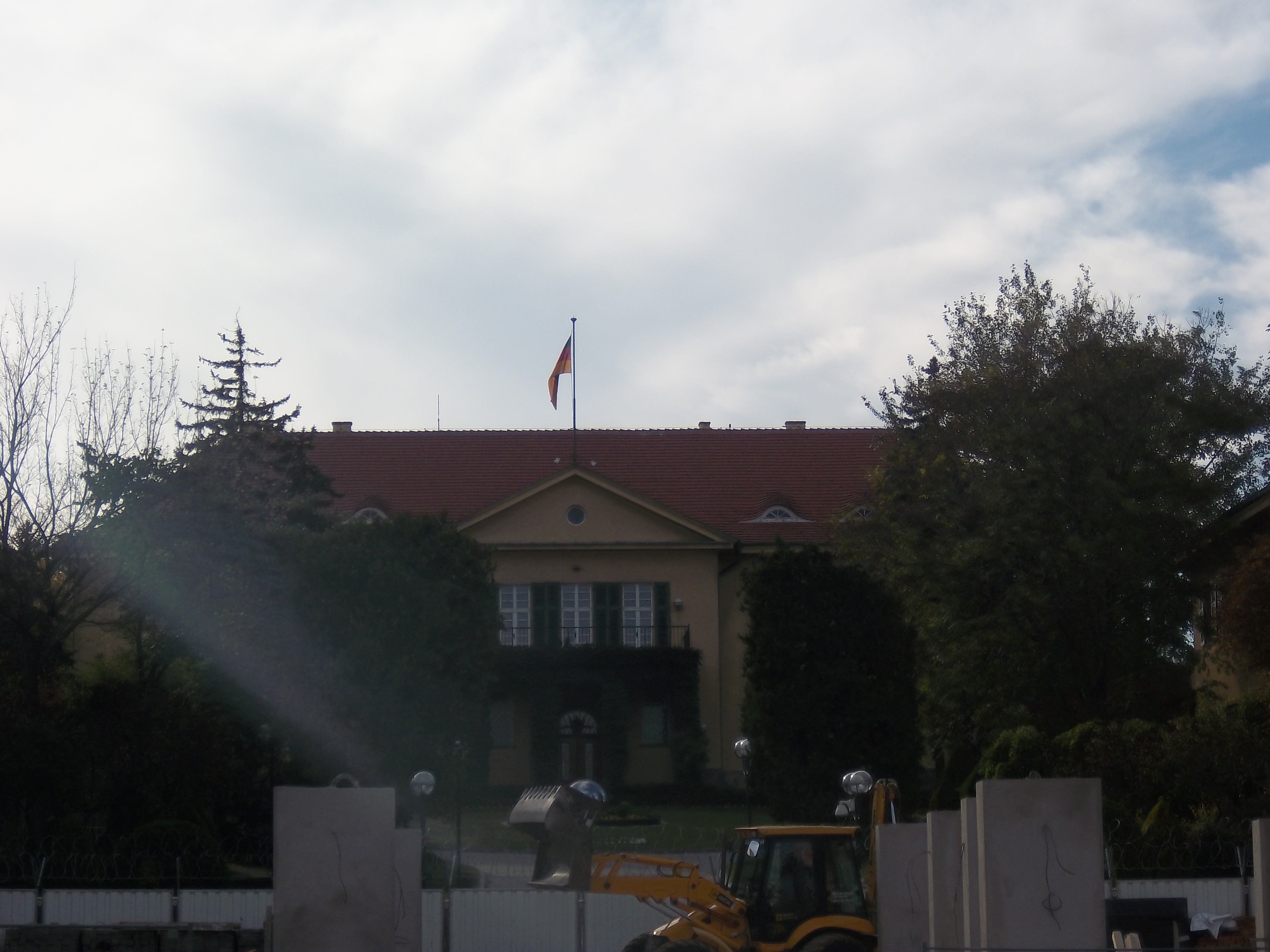 Srpskohrvatski / српскохрватски: Ambasada Njemačke u Ankari.